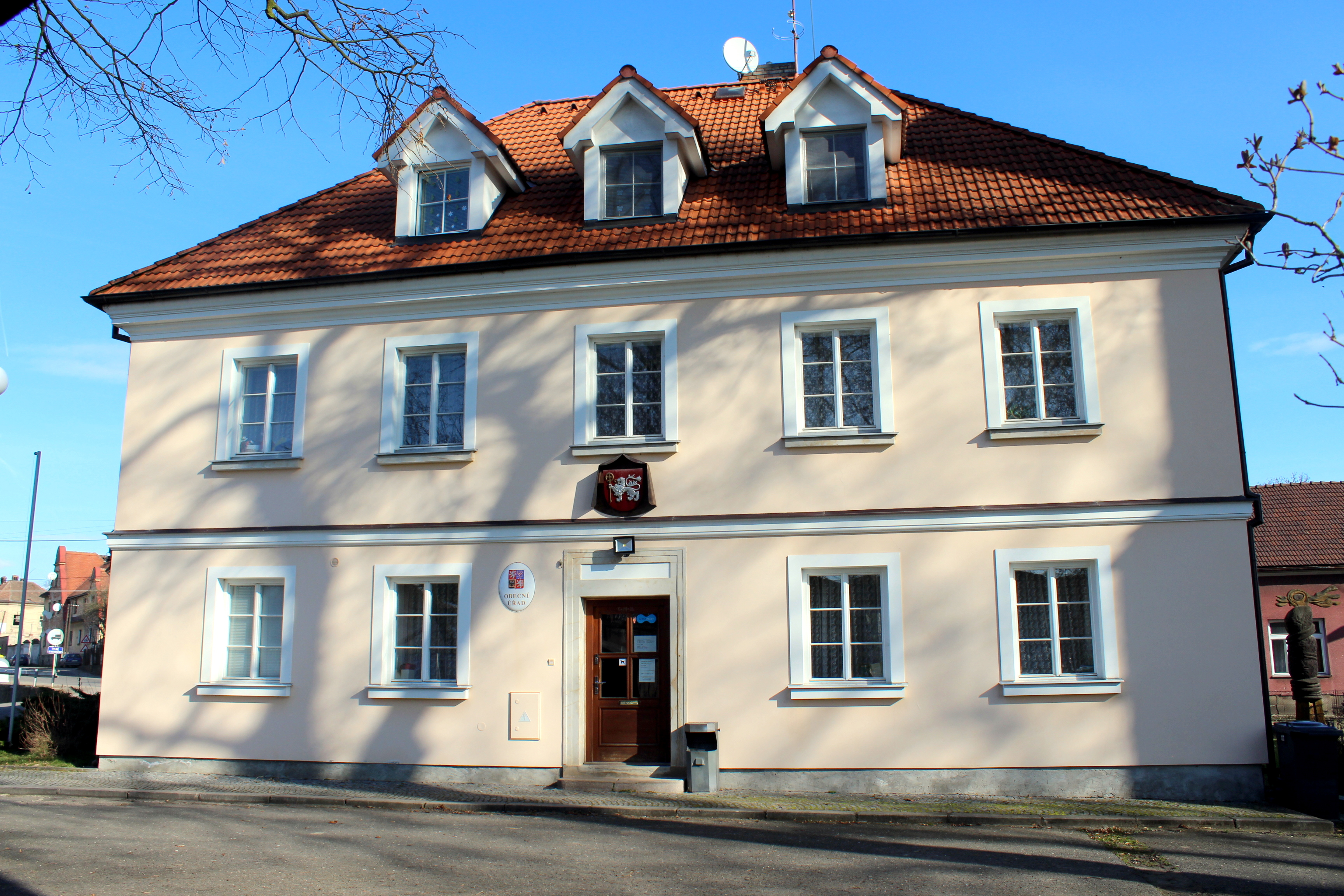 Klášter Hradiště n. Jiz. - obecní úřad